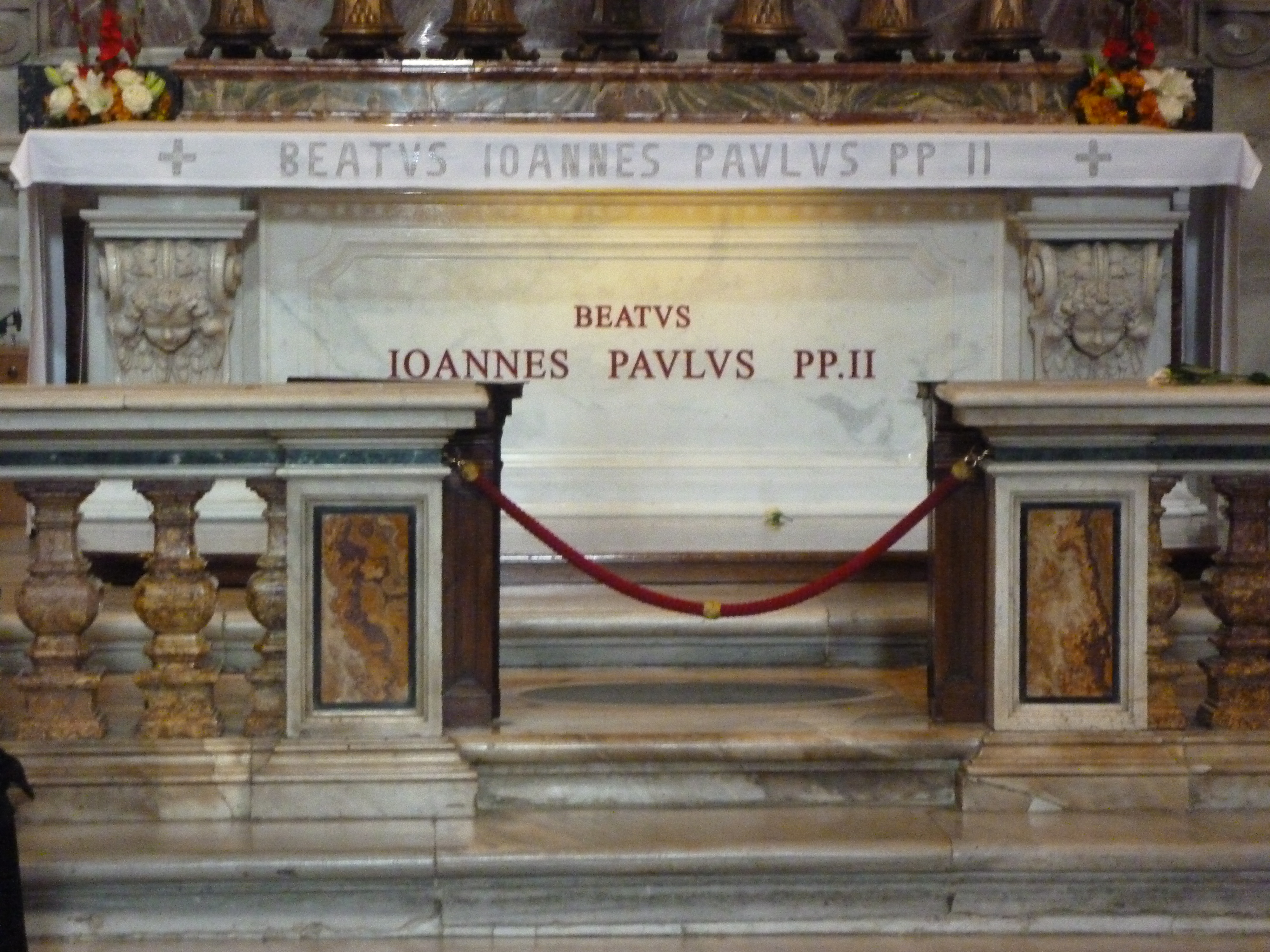 Rome, summer 2012